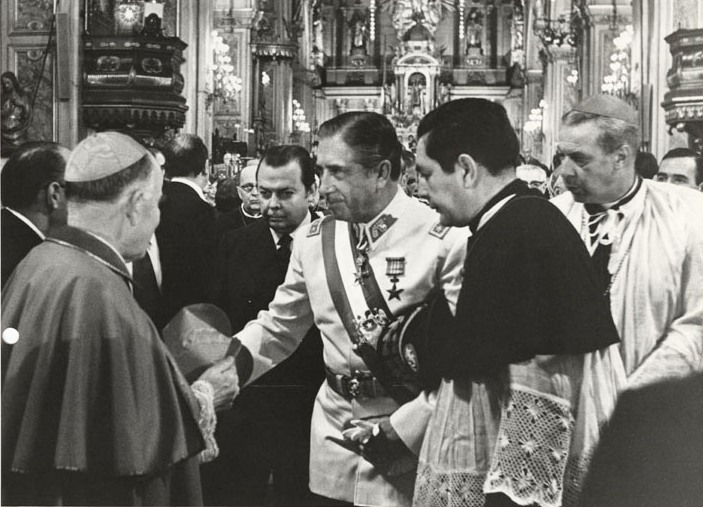 Te Deum en la Catedral de Santiago de Chile. Silva Henríquez, Raúl. Cardenal de Chile (de espaldas)/ n.i./ Pinochet Ugarte, Augusto. Presidente de la Junta de Gobierno